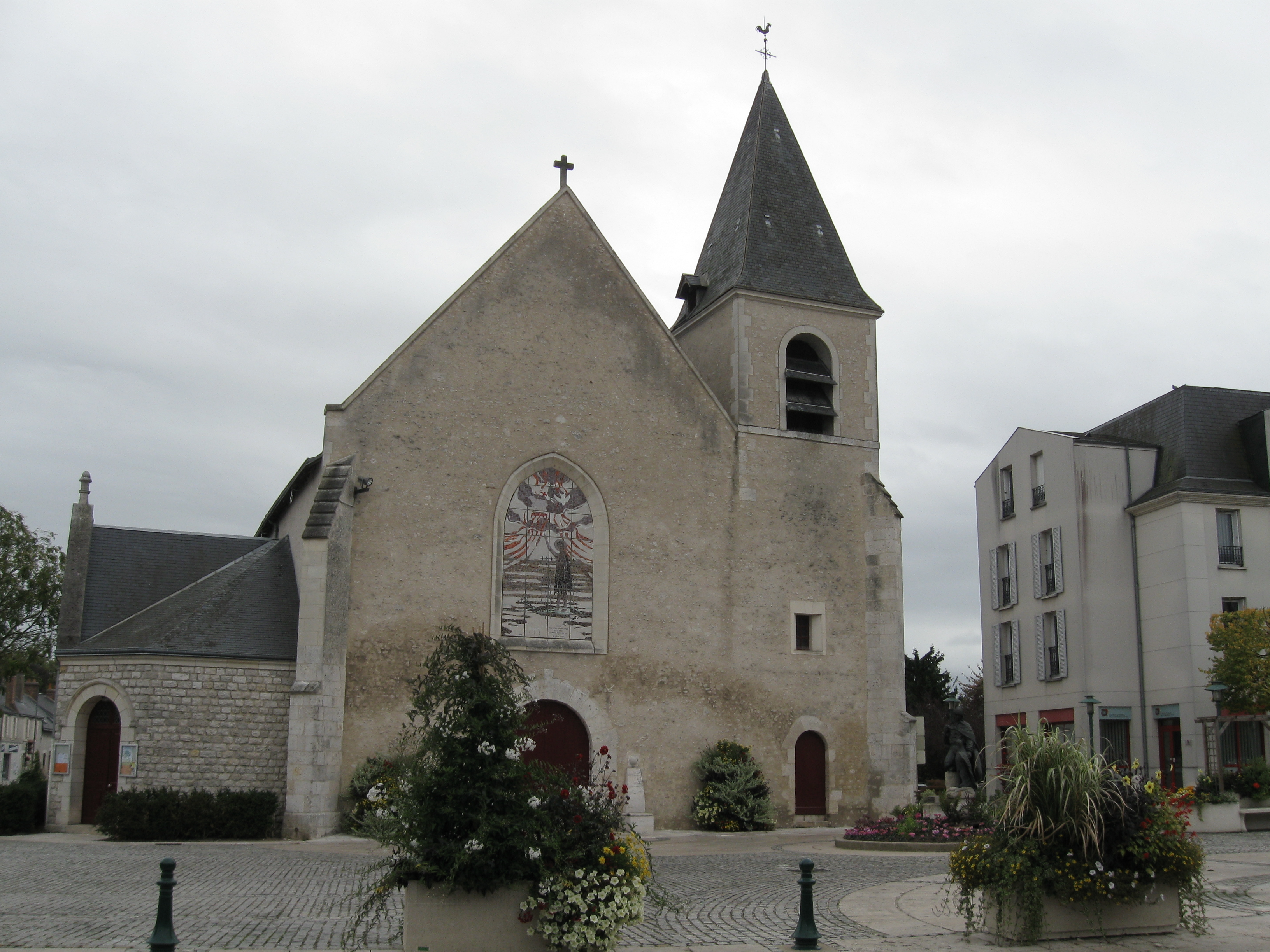 Église Saint-Jean-Baptiste, Saint-Jean-le-Blanc, Loiret, France